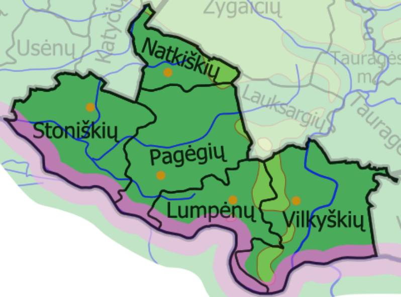 Староства Пагегяйского самоуправления